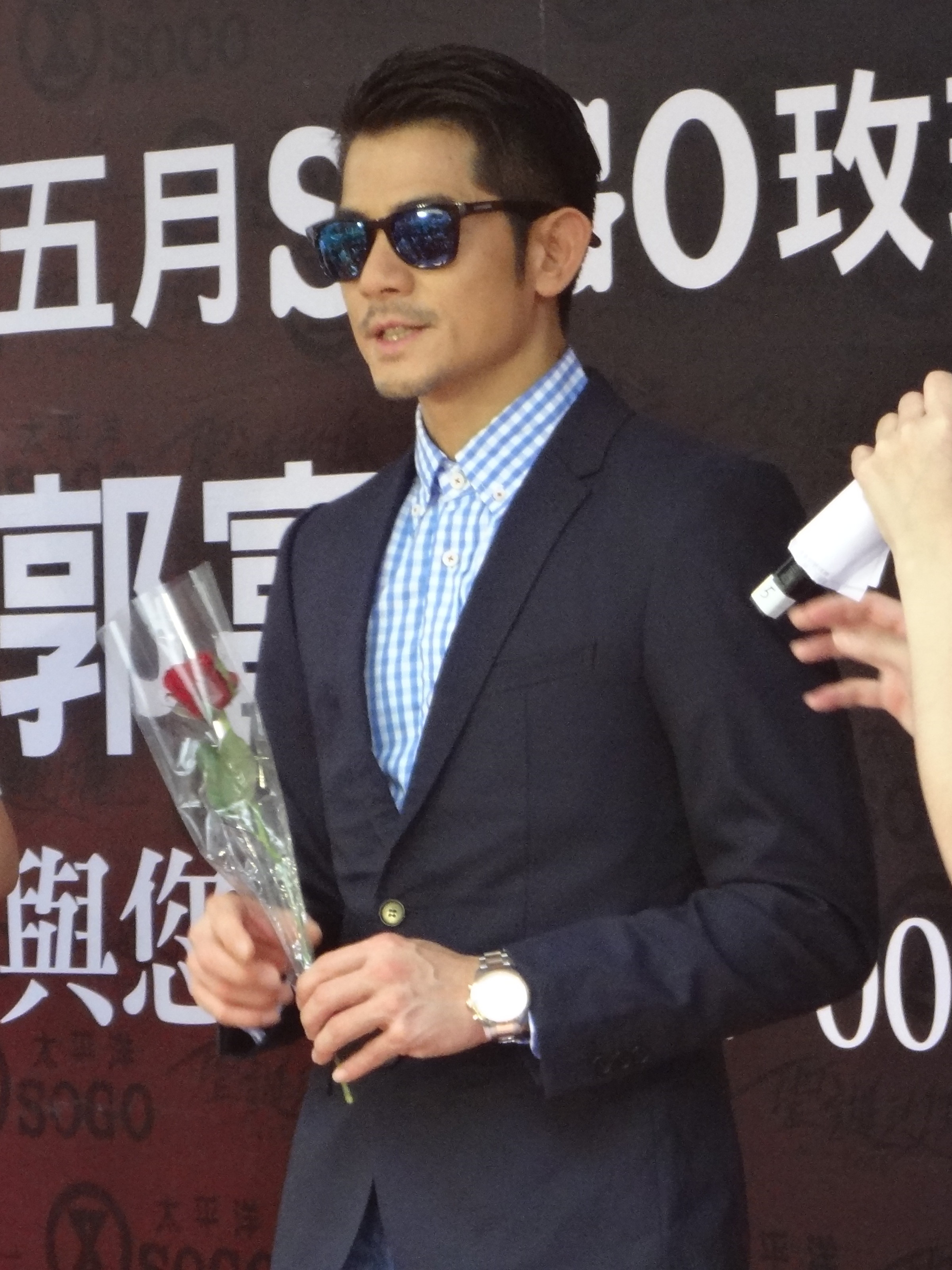 中文（台灣）: 2013年5月18日，郭富城在太平洋崇光百貨臺北忠孝館宣傳電影《聖誕玫瑰》。